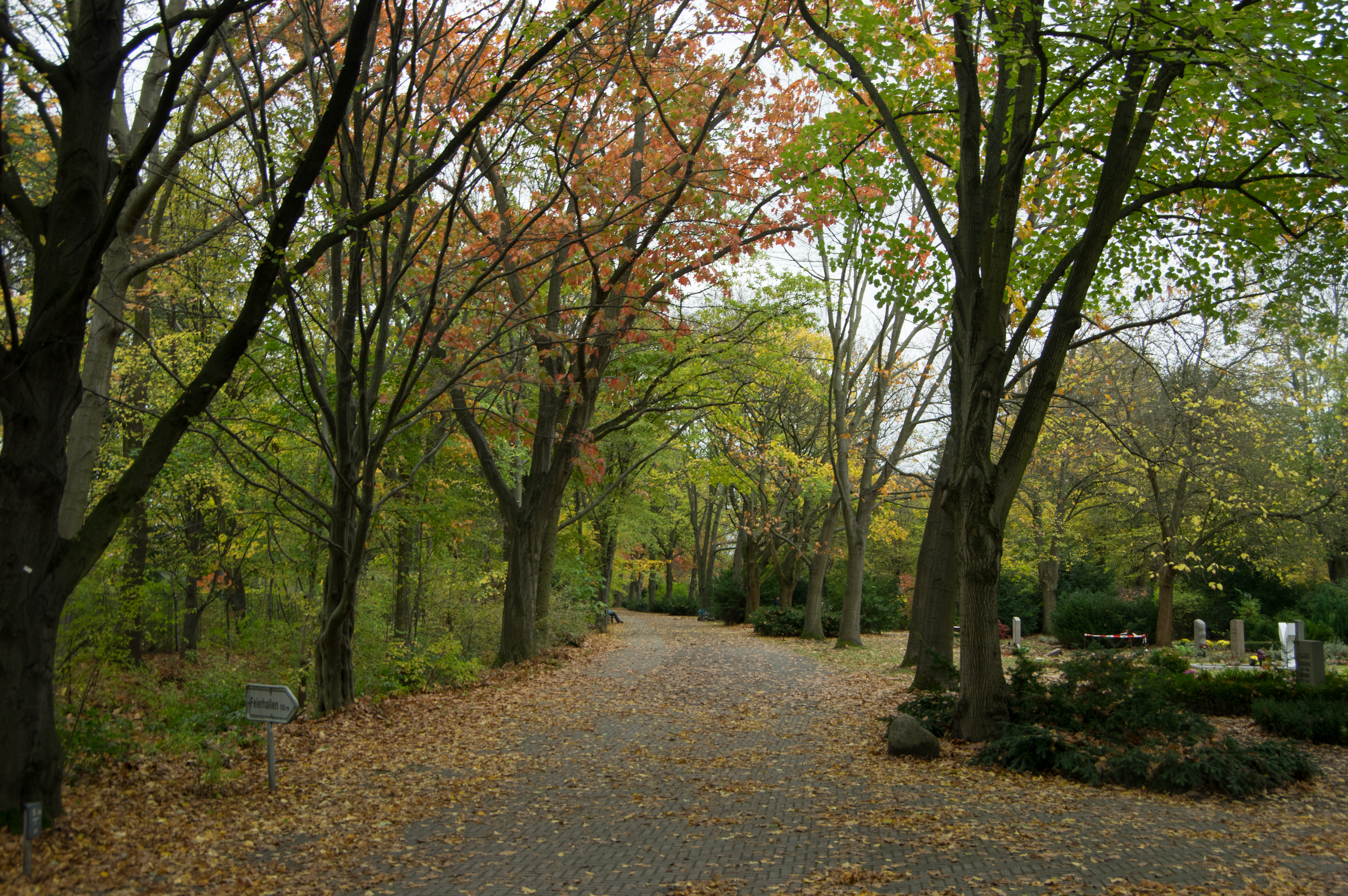 Neukölln in Berlin. Der Parkfriedhof befindet sich direkt nördlich de Britzer Garten an der Buckower Allee.